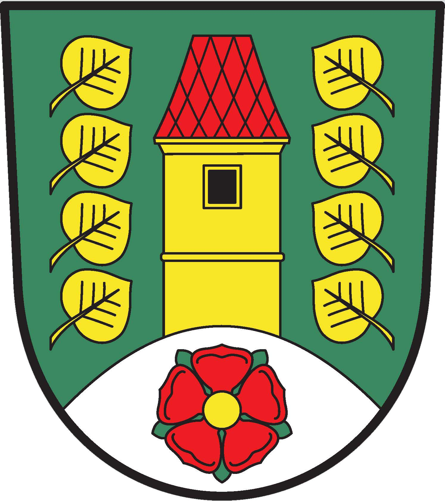 znak,Malonty , okres Český Krumlov